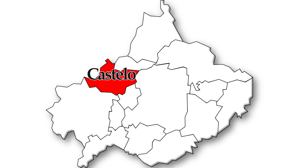 População